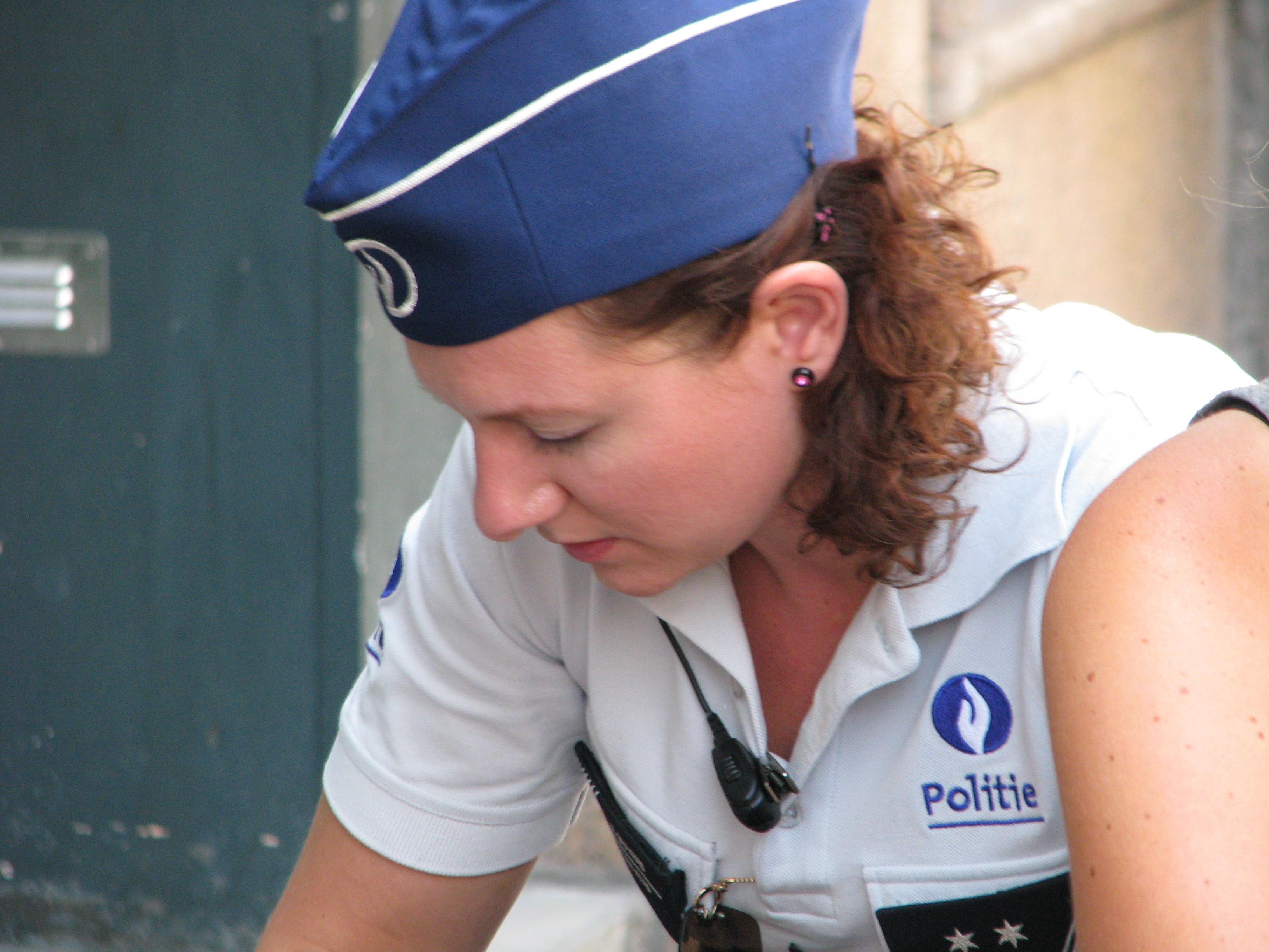 An Vanderstighelen tijdens een break van opnamen van "Zone Stad". Locatie : Eiermarkt - 2000 Antwerpen